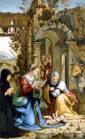 Nativity de Cesare da Sesto